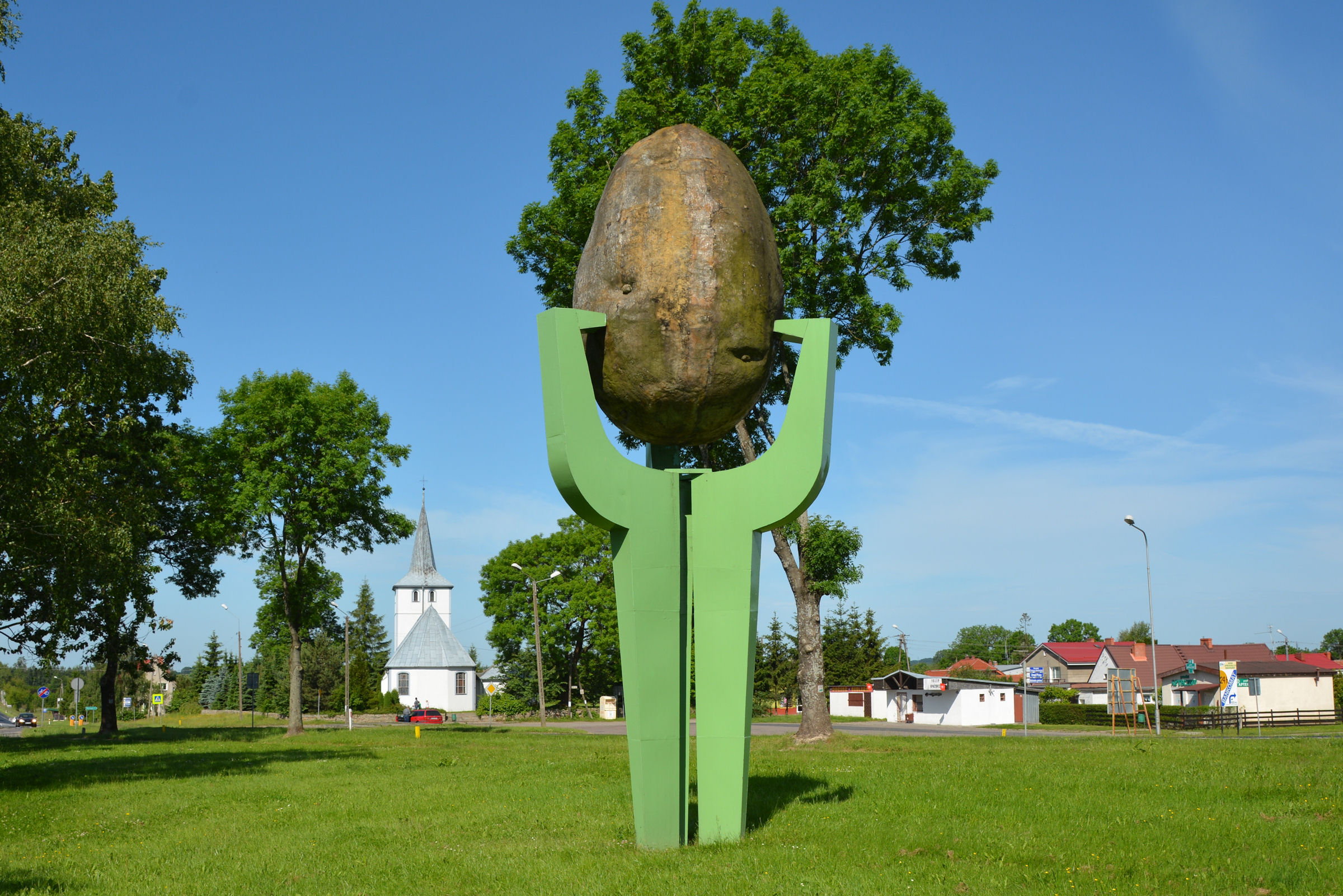 Biesiekierz - pomnik ziemniaka i kościół